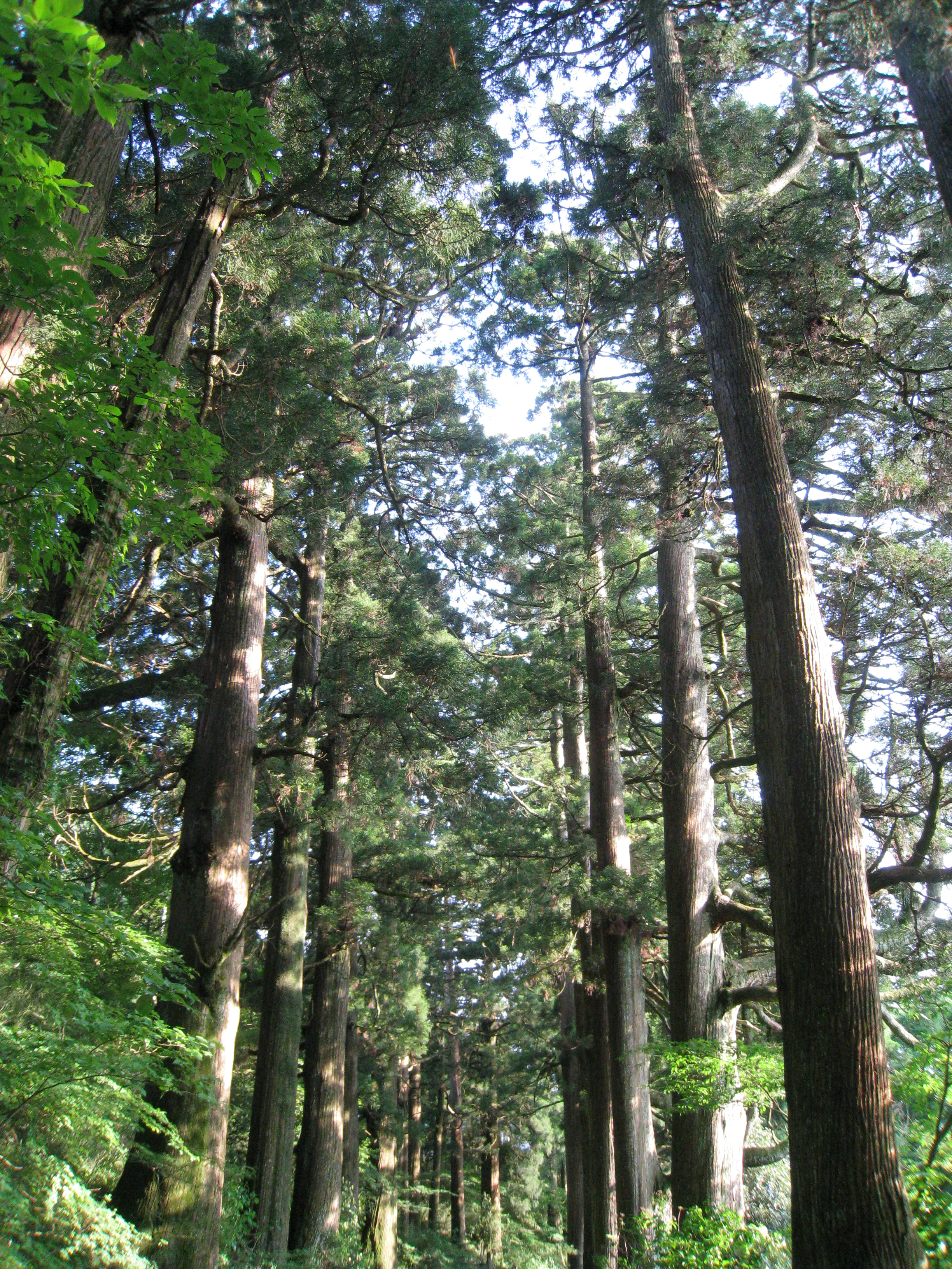 Cryptomeria japonica, Hakone, Kanagawa, Japan.